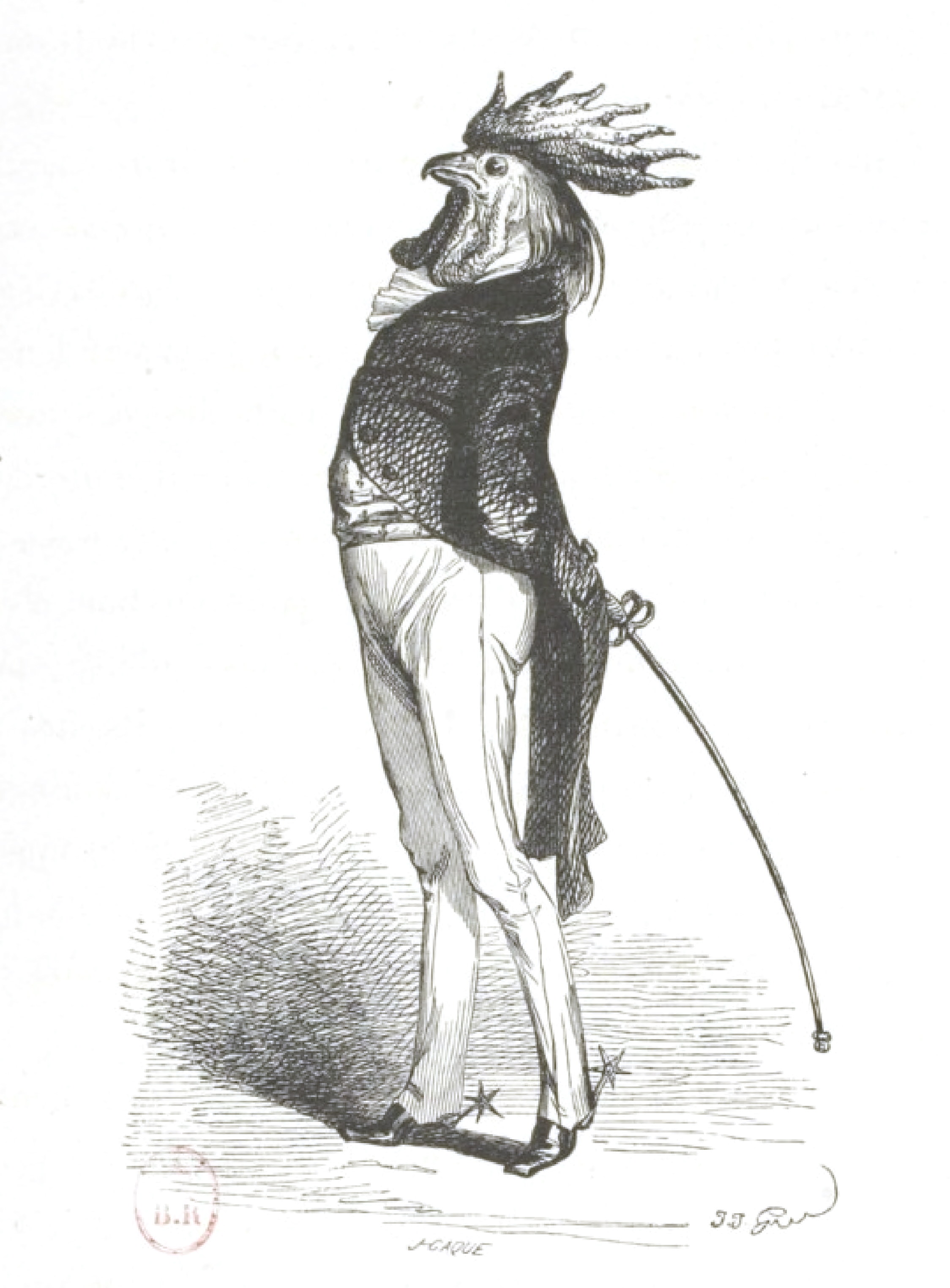 Illustrations du livre